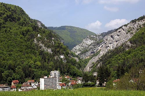 Blick hin zur Klus von Moutier (Gorges de Moutier)